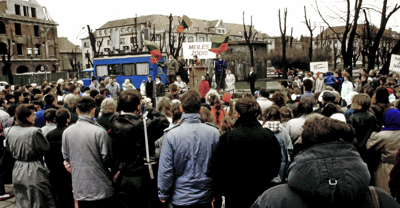 Meiles Zodis håller möte i Klaipeda 1992.